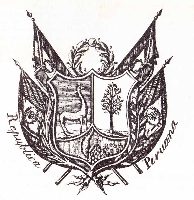 Escudo del Perú 1825